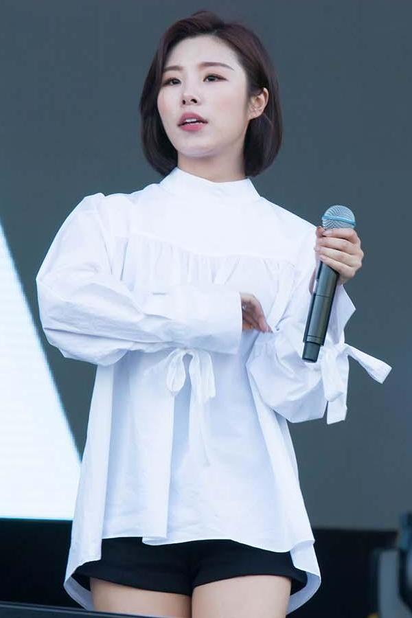 17.09.23 조이올팍페스티벌 - 마마무(MAMAMOO)